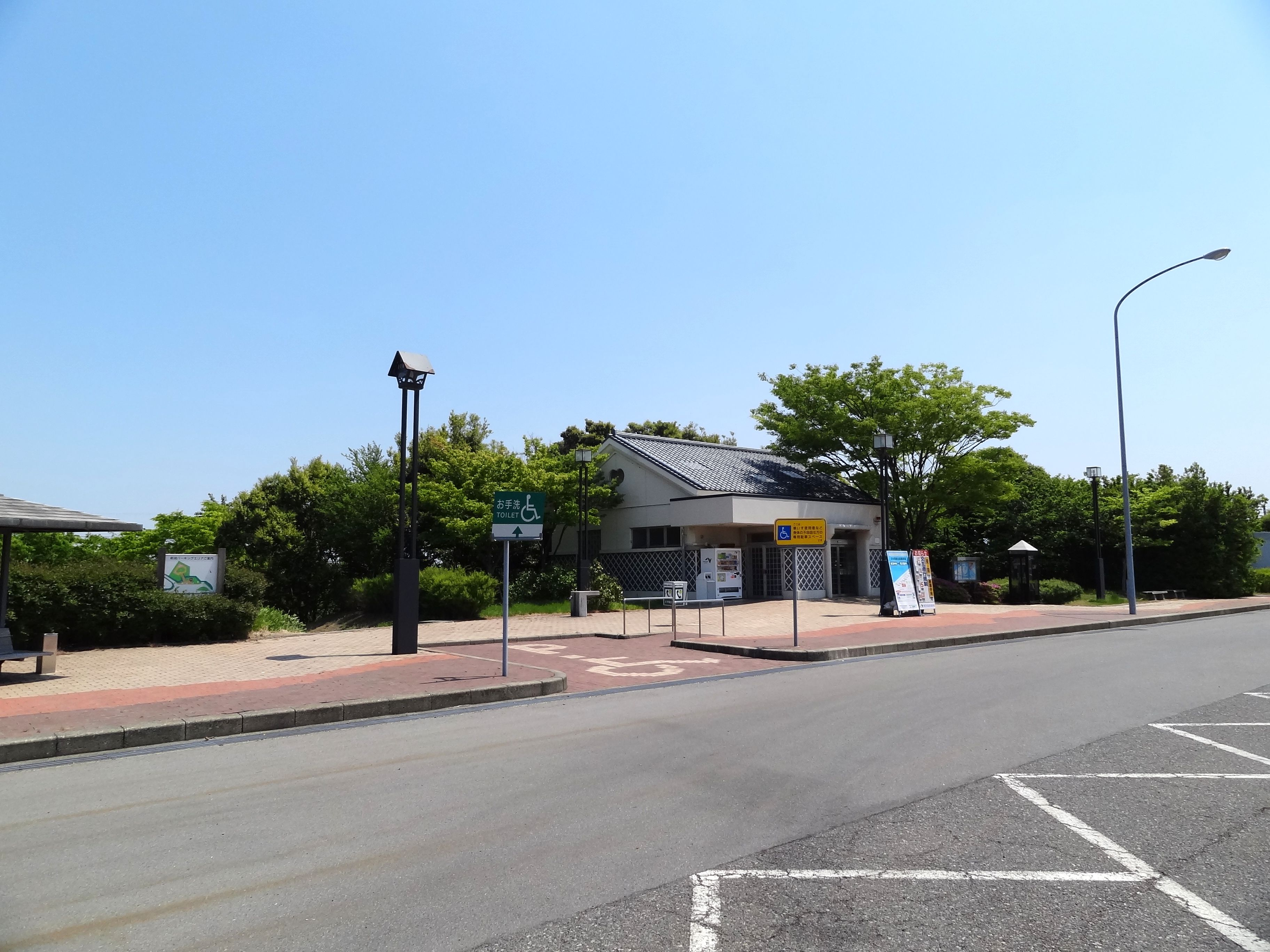 磐越自動車道 新潟パーキングエリア（上り線）